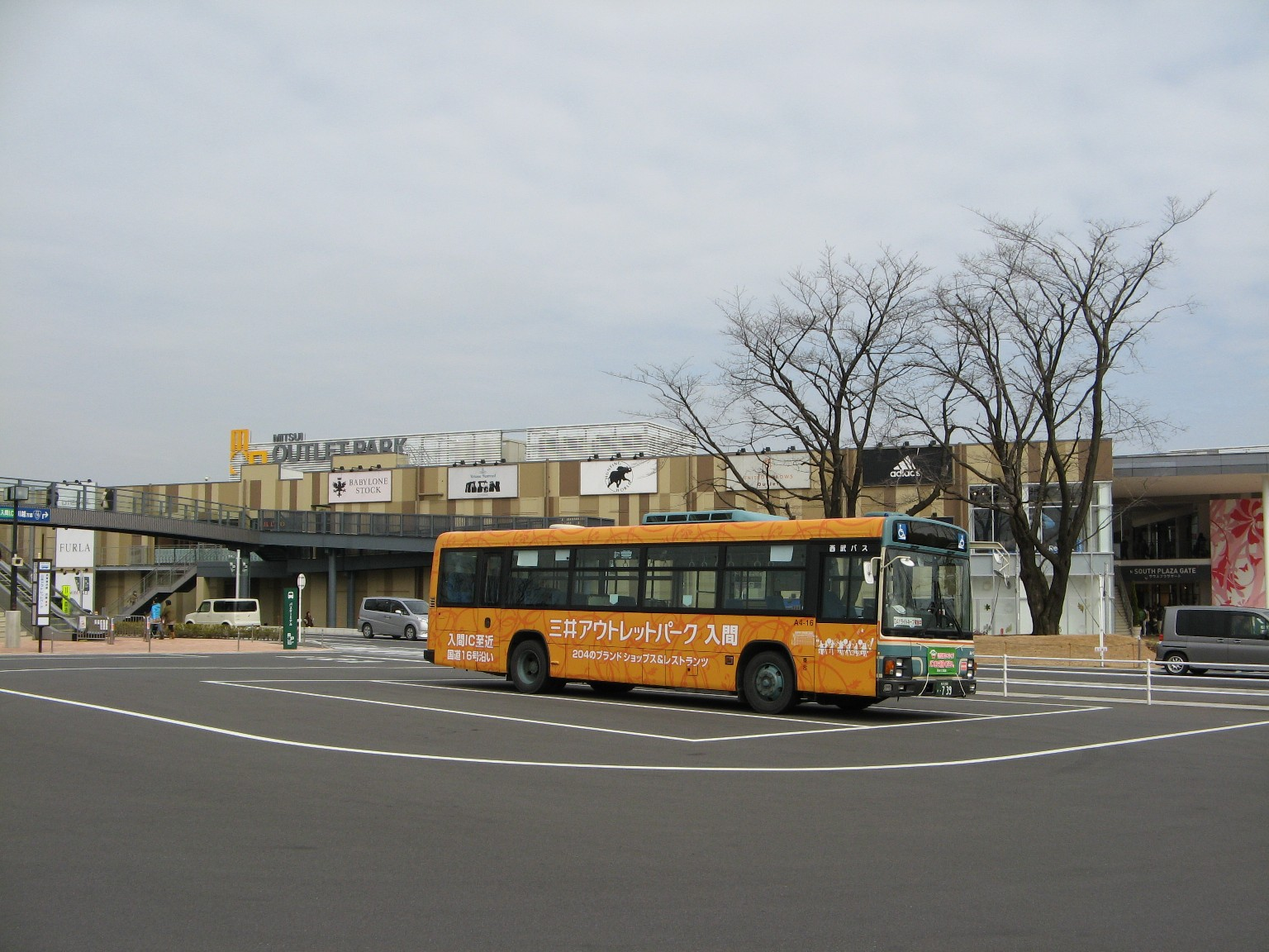 三井アウトレットパーク入間のバス停留所に停車する西武バスA4-16号車。